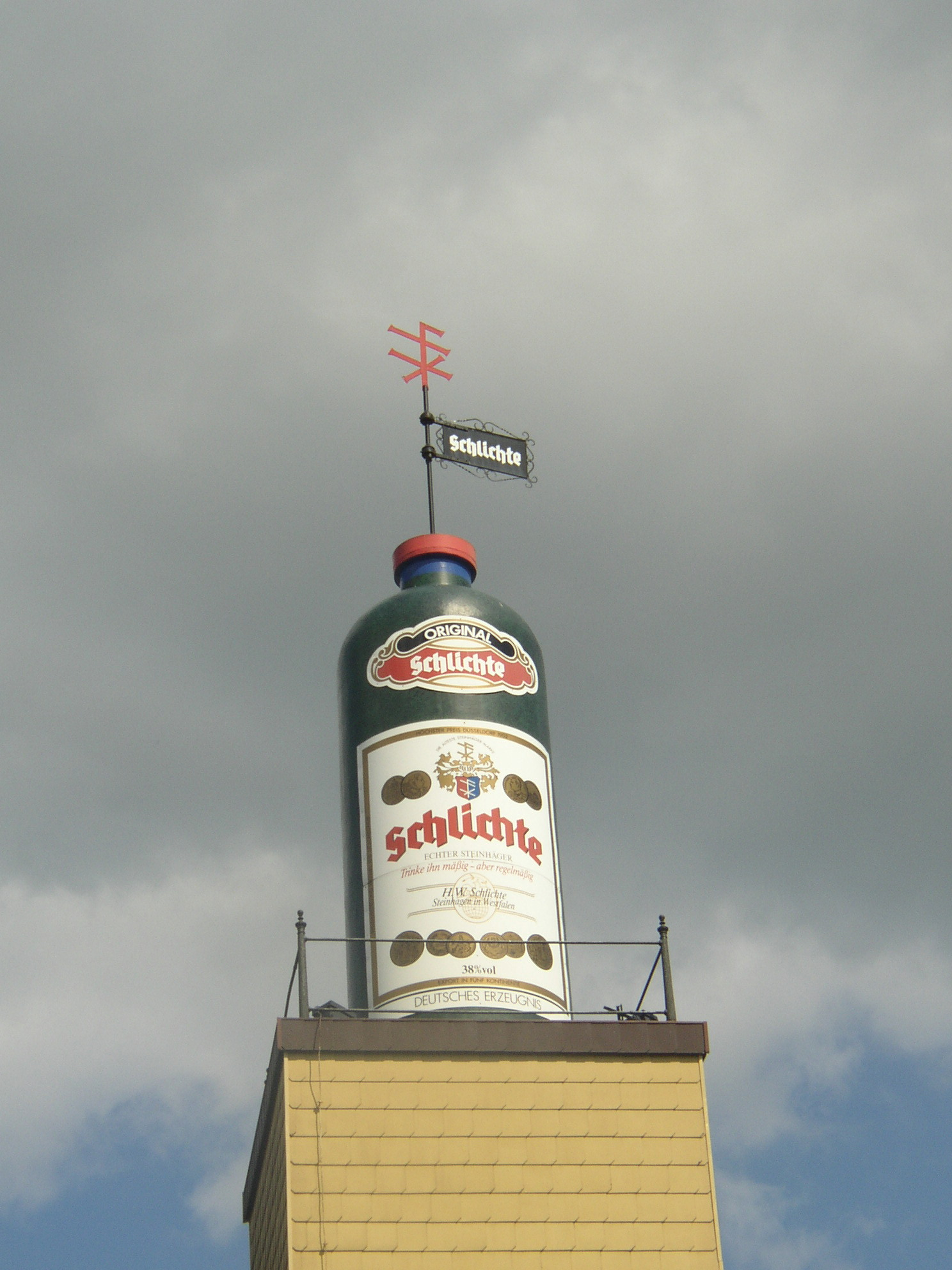 Steinhagen - Steinhaegerkrug